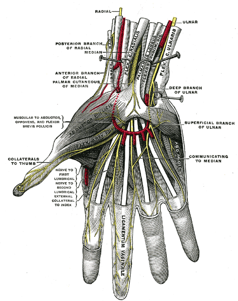 Superficial palmar nerves. (Testut.)